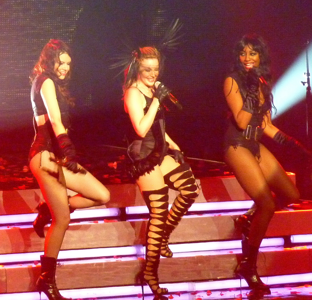 Kylie Minogue y sus coristas cantando en su primer tour nortemamericano